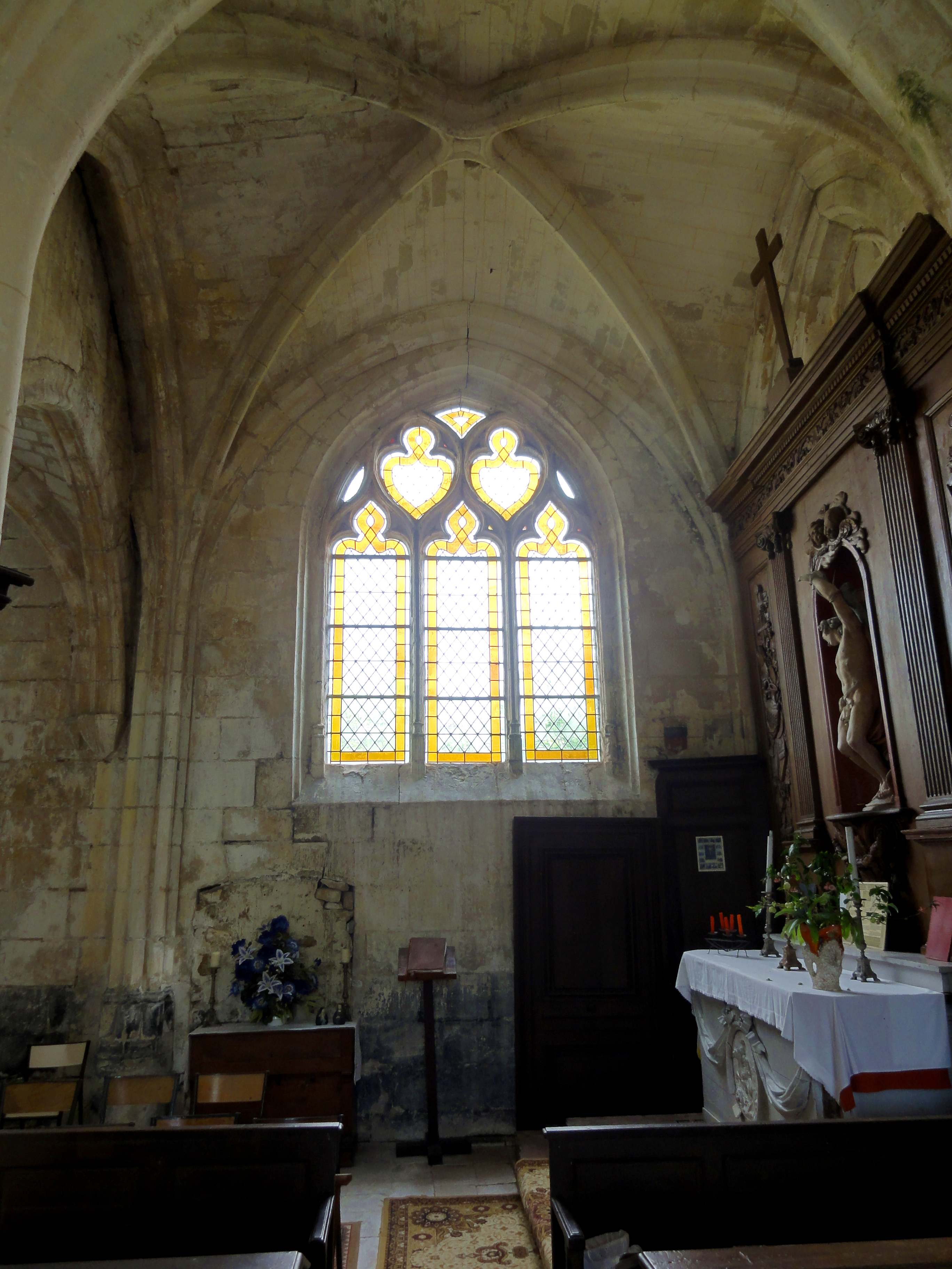 Intérieur de l'église - voir titre.